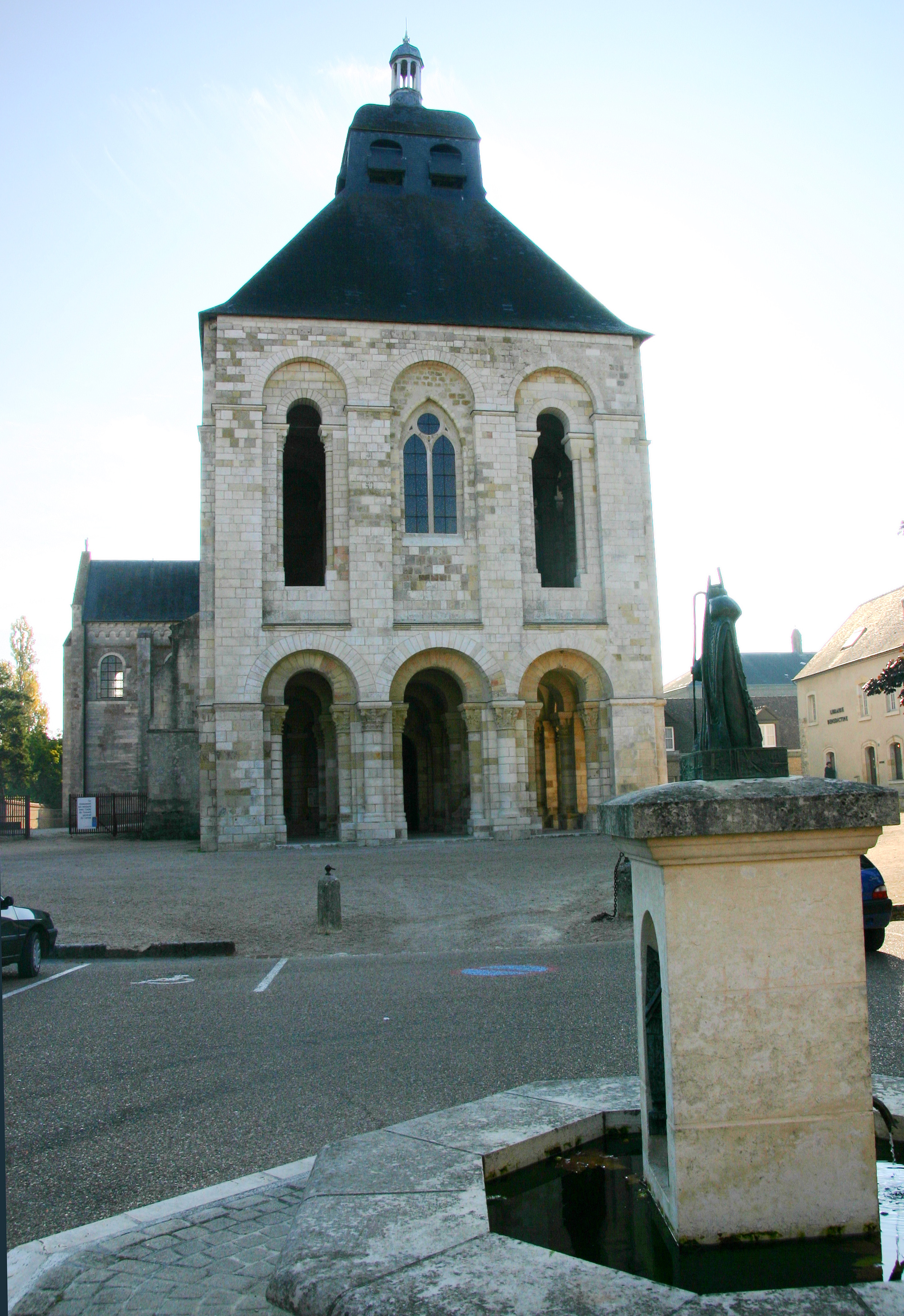 Saint-Benoît-sur-Loire